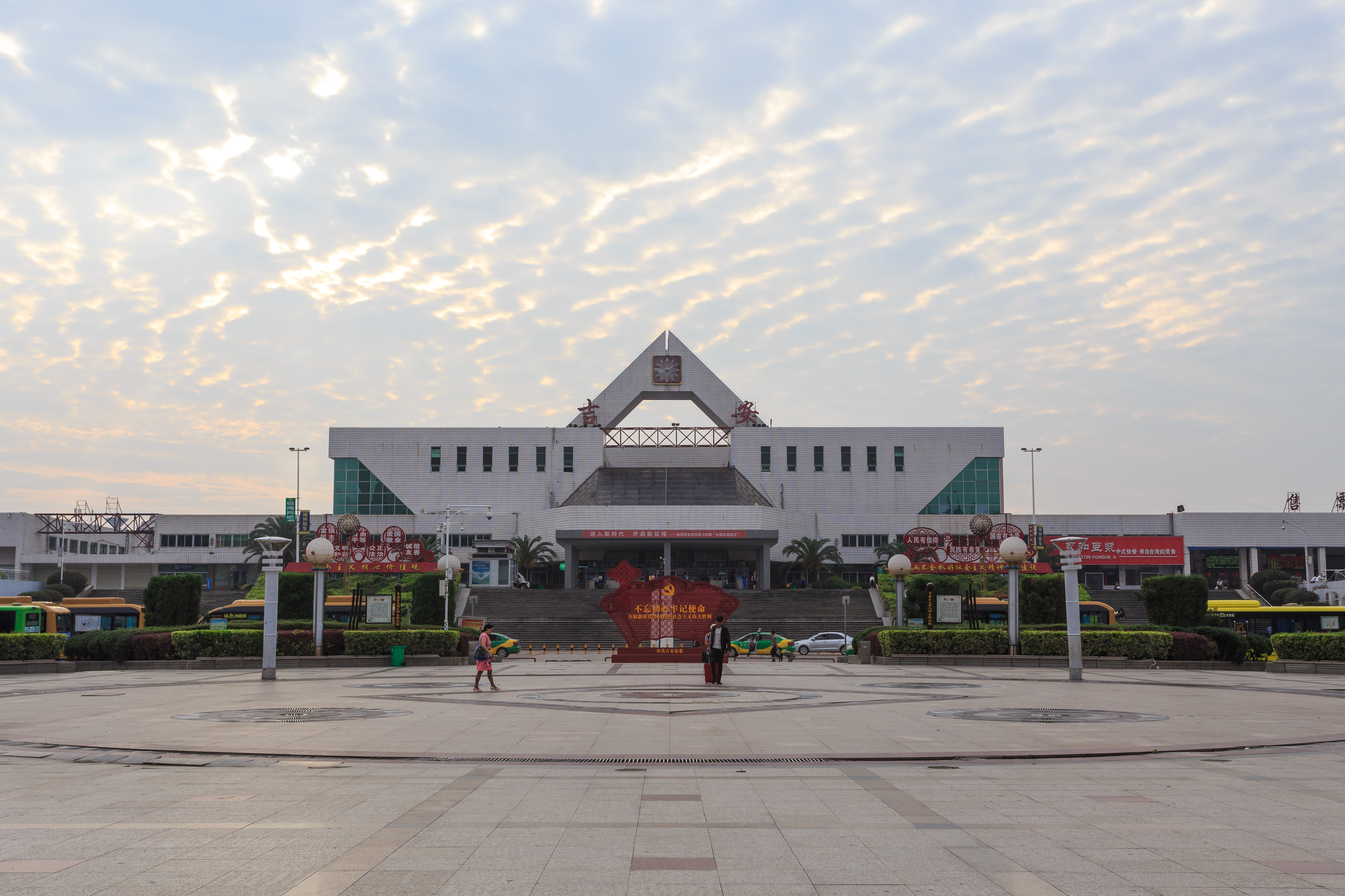 吉安站